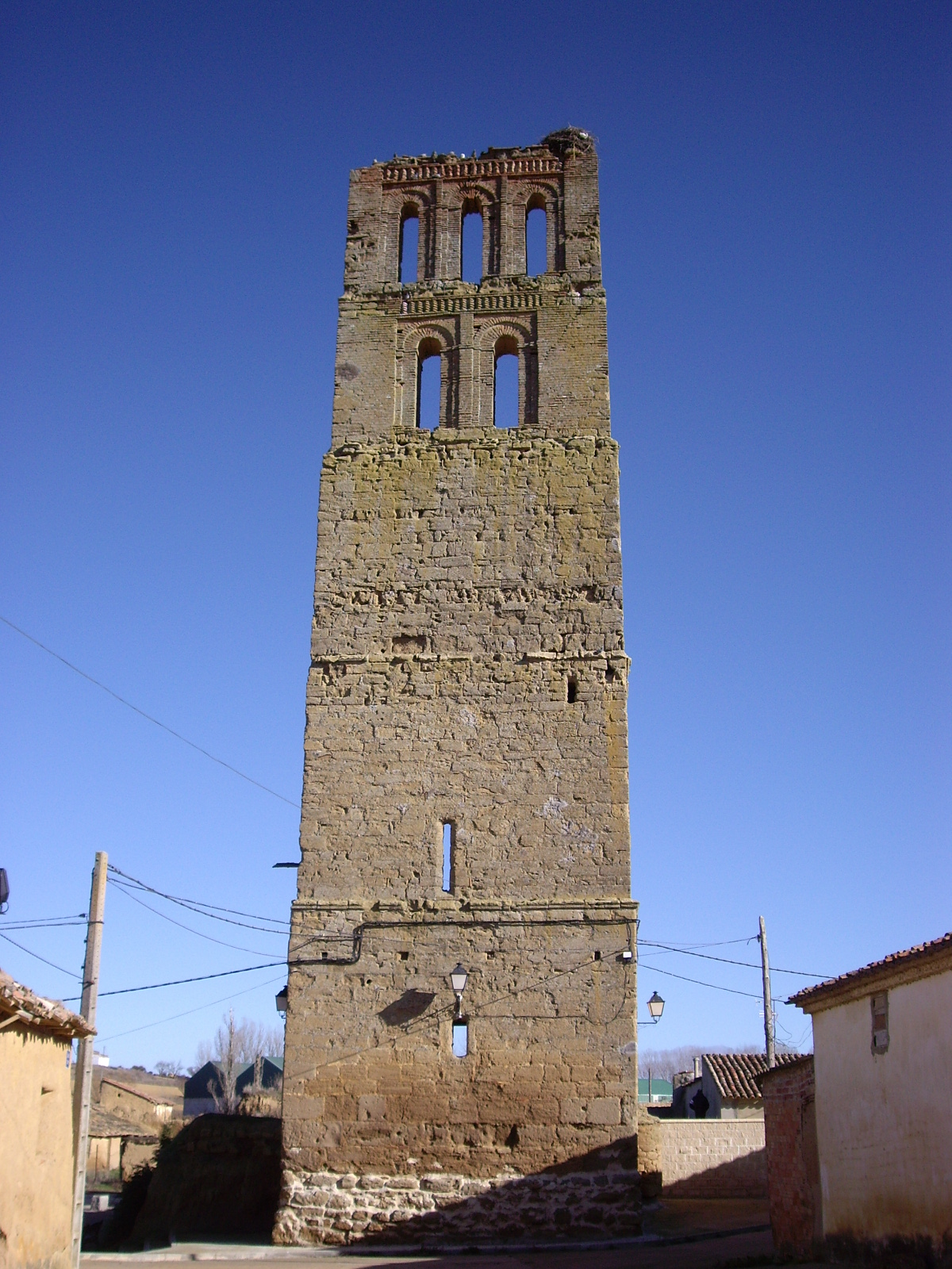 Torre de la antigua iglesia de San Pedro de Villacarralón